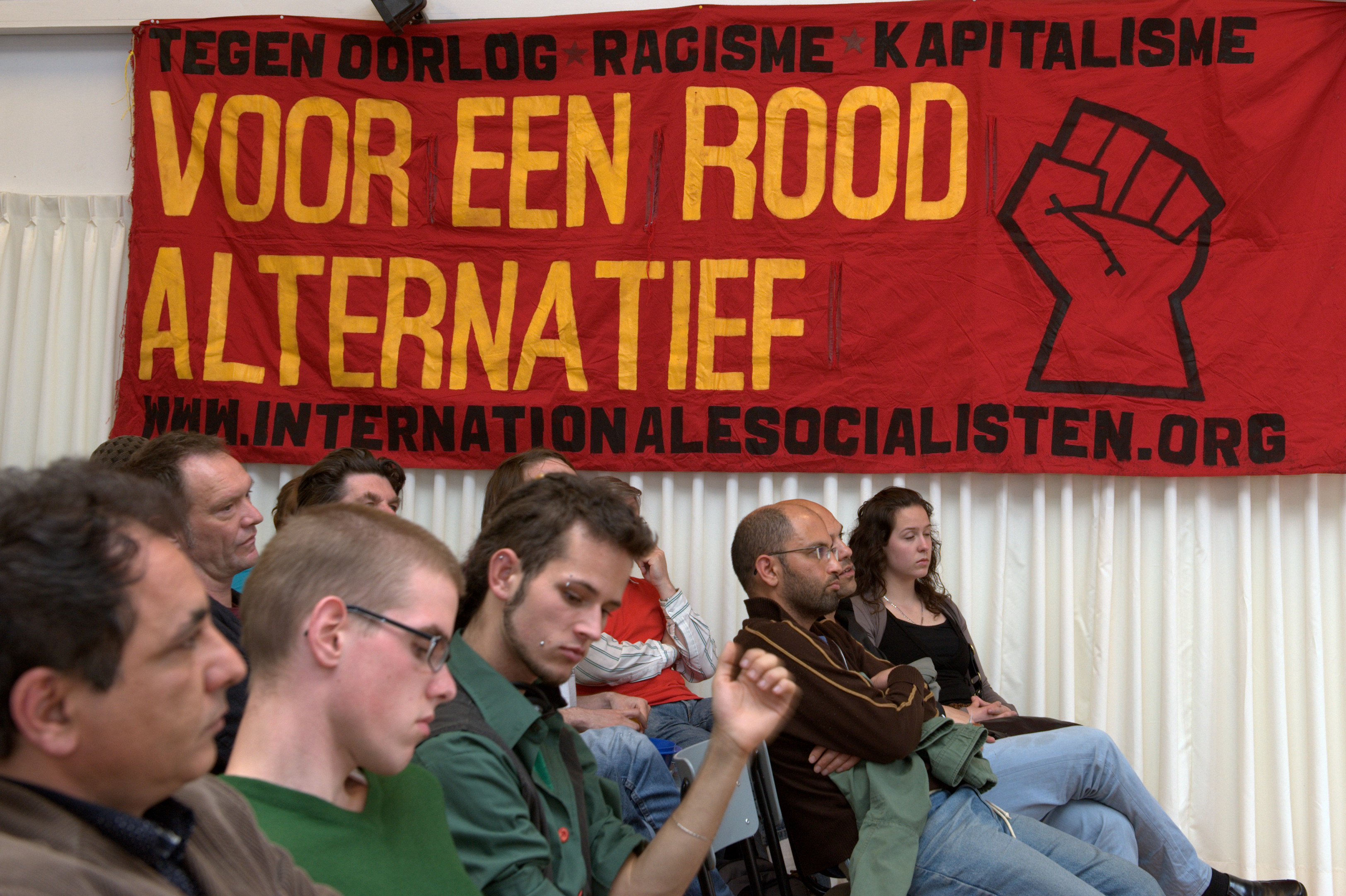 Marxisme festival Amsterdam